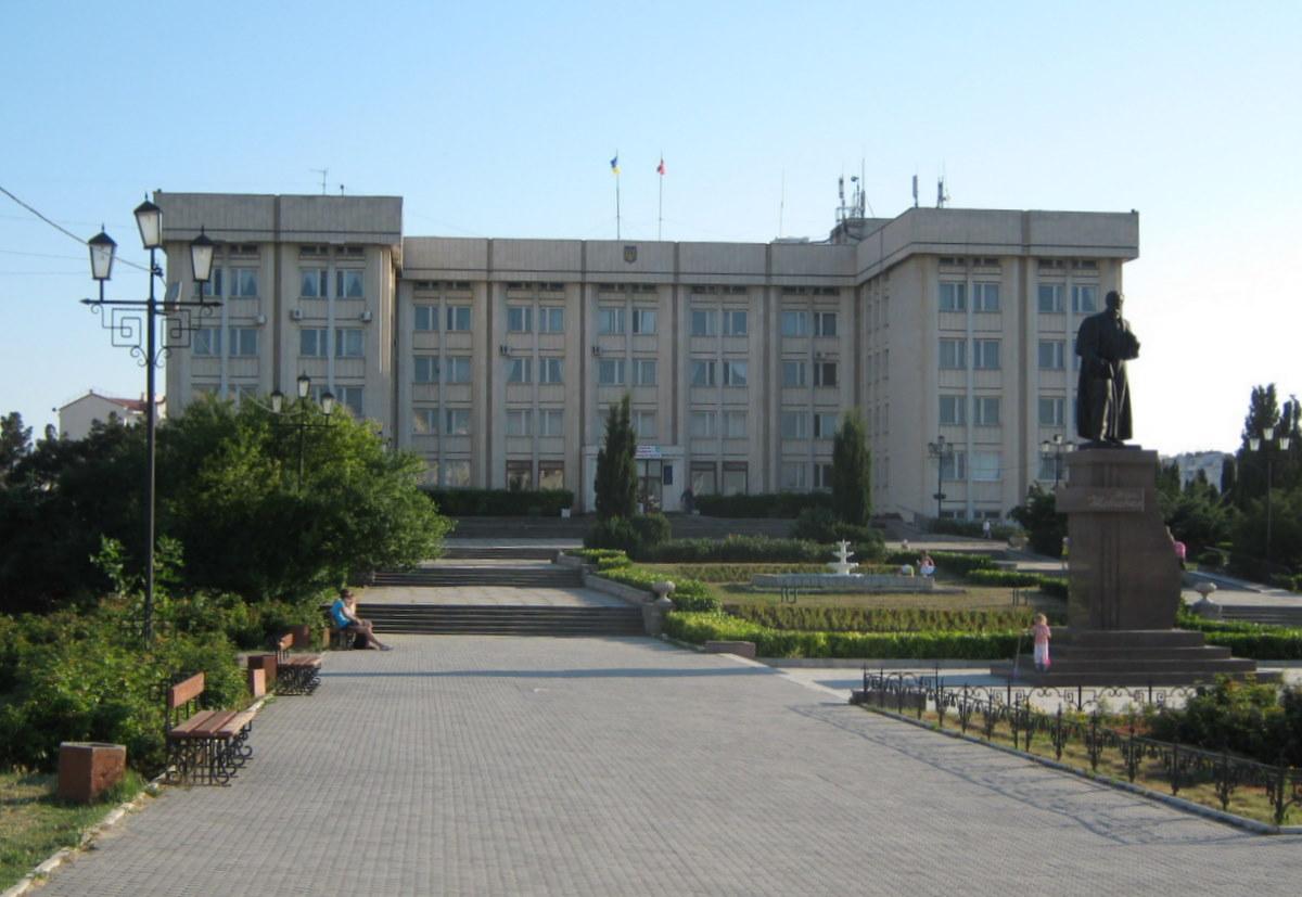 Районна держадміністрація Гагарінського району Севастополя